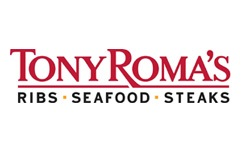 Logo von Tony Roman